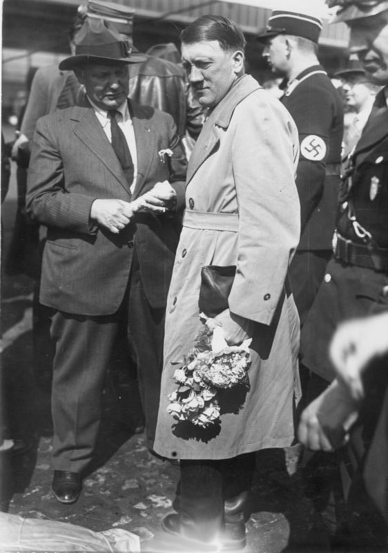 Hitler und Göring im Flughafen Tempelhof [1932]